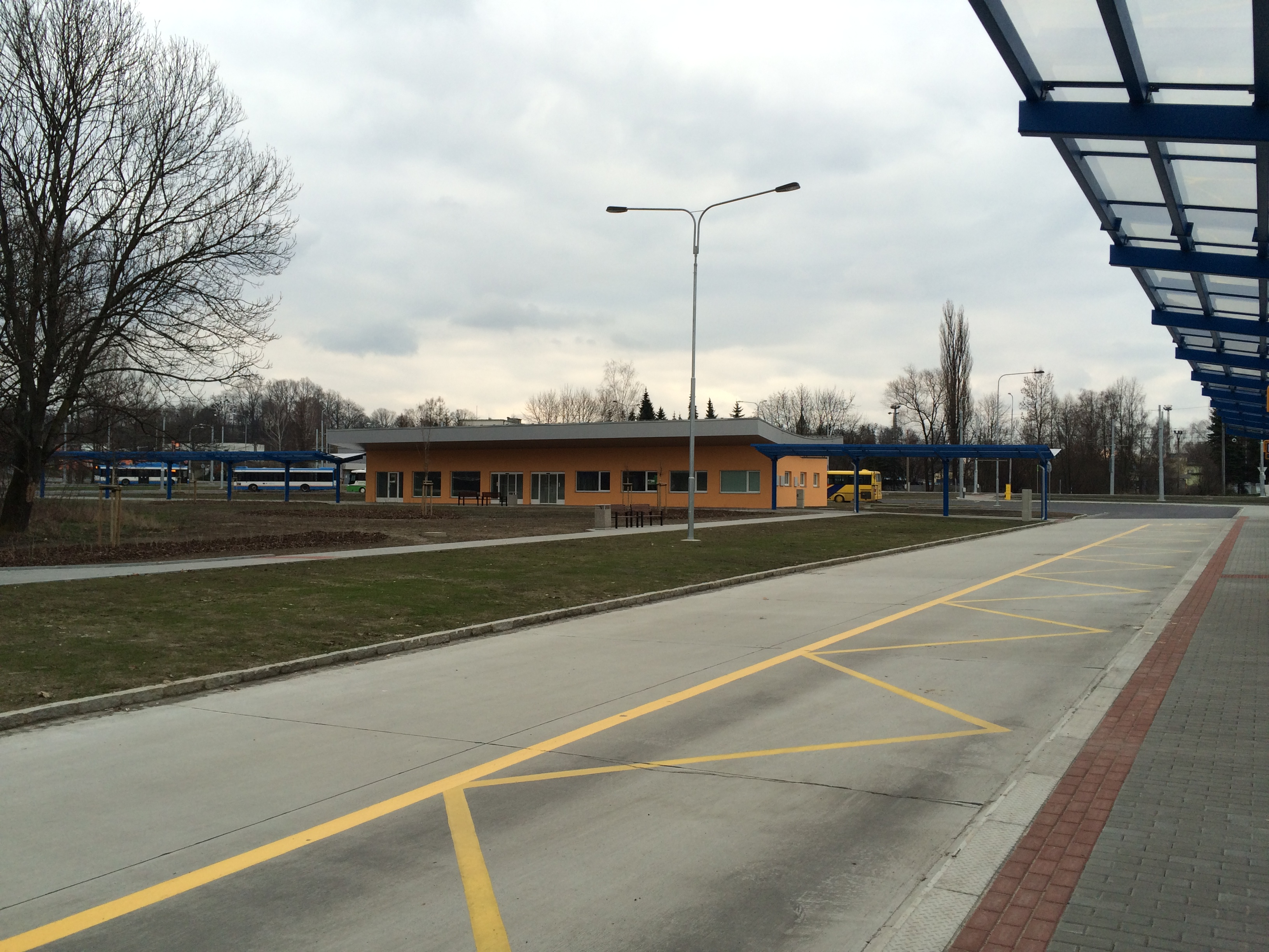 Dopravní terminál Hranečník (březen 2016).